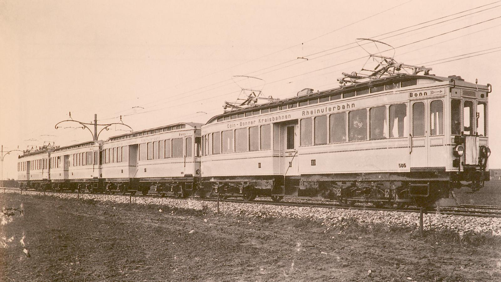 Triebwagen ET505 der Cöln-Bonner Kreisbahnen (später KBE)